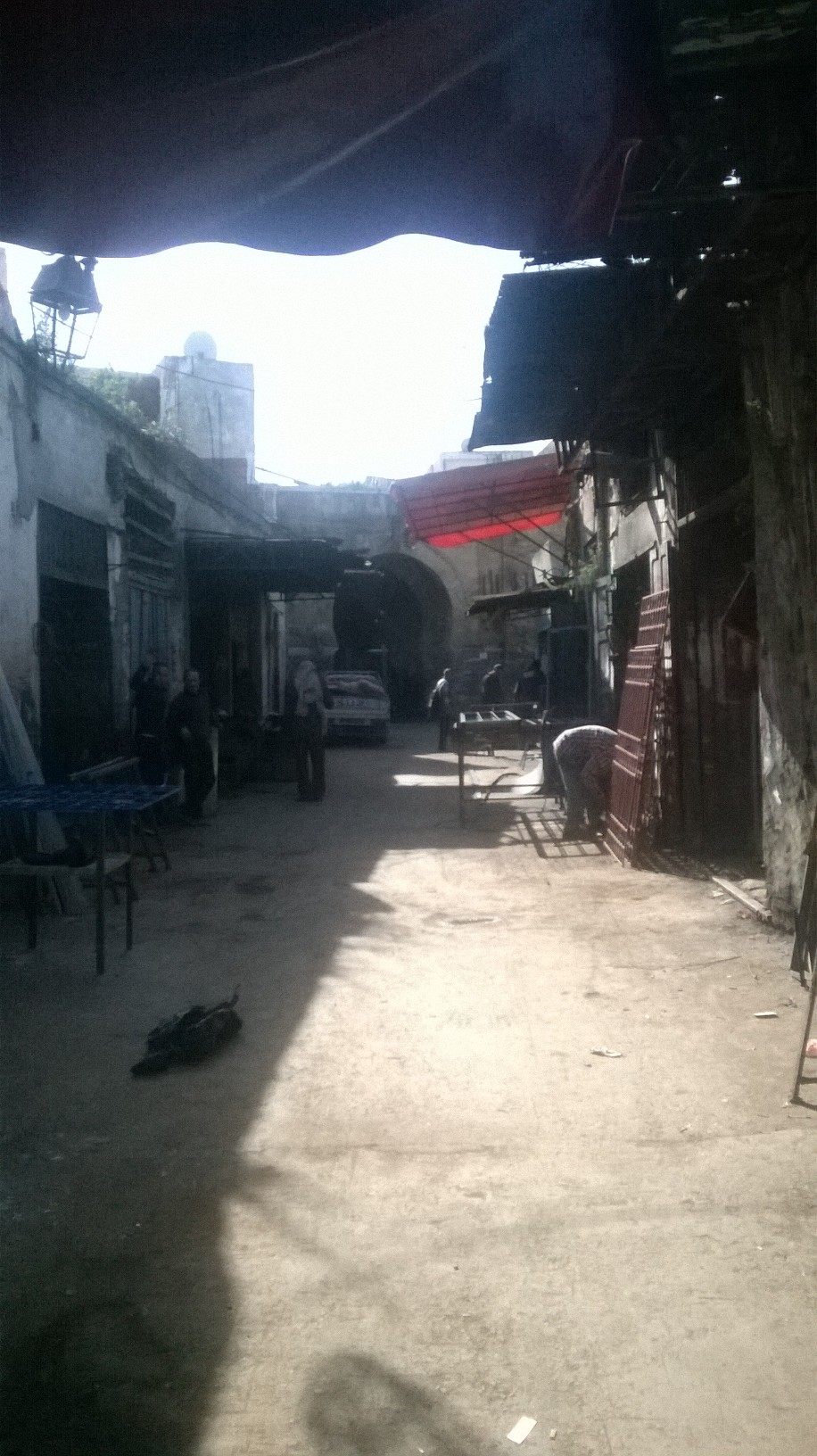 La médina de Tunis مدينة تونس العتيقة